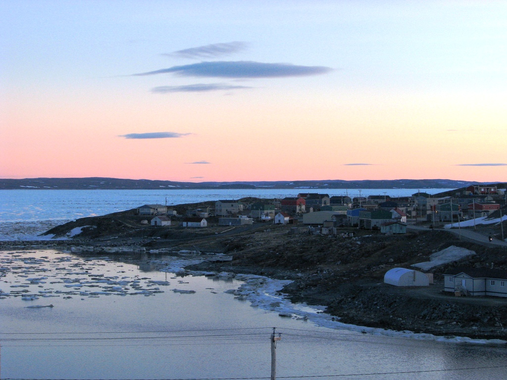 Kangirsuk at dawn or dusk.